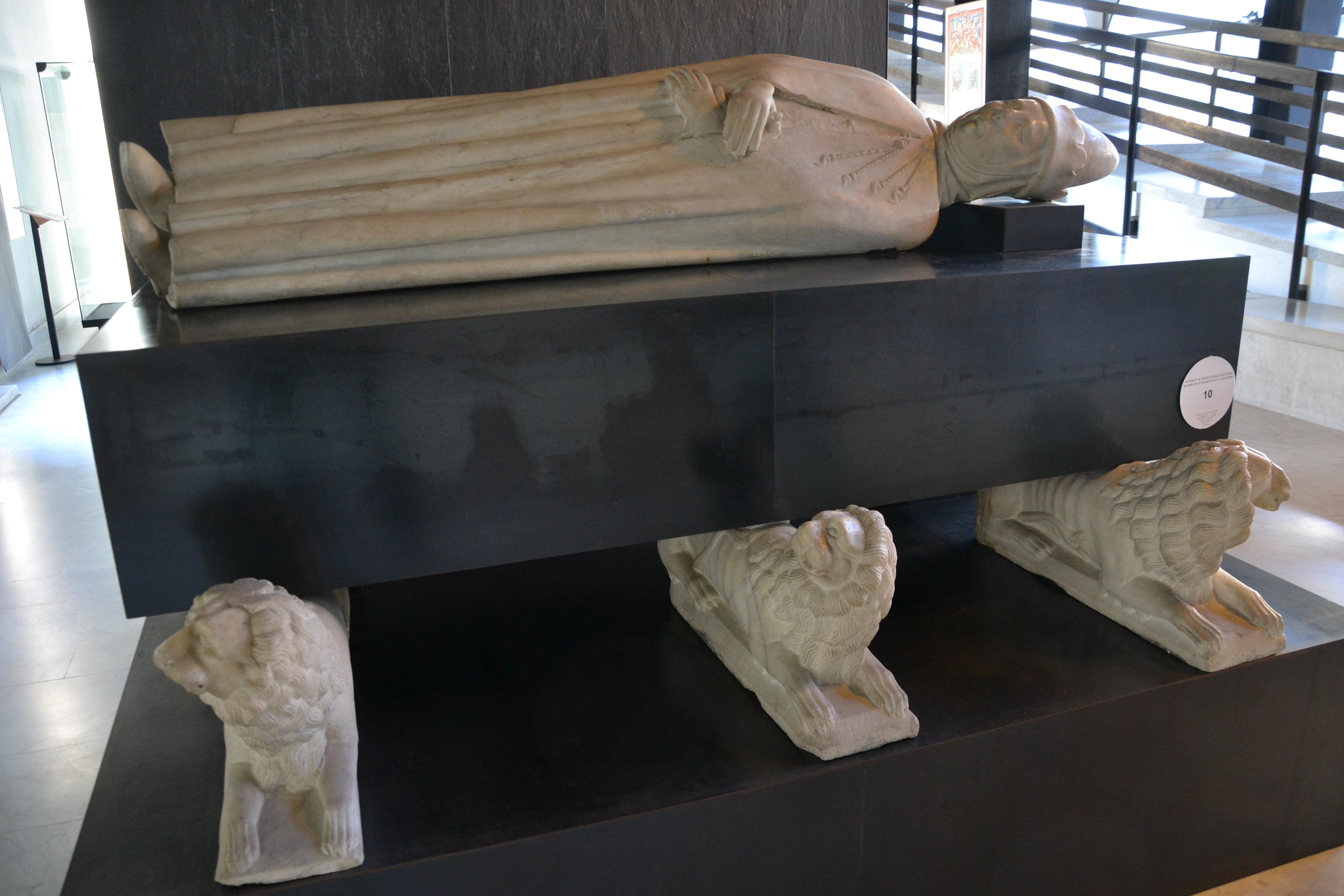 Museo di Sant'Agostino (Genova) Scultore genovese Monumento sepolcrale di Simone Boccanegra (1363)